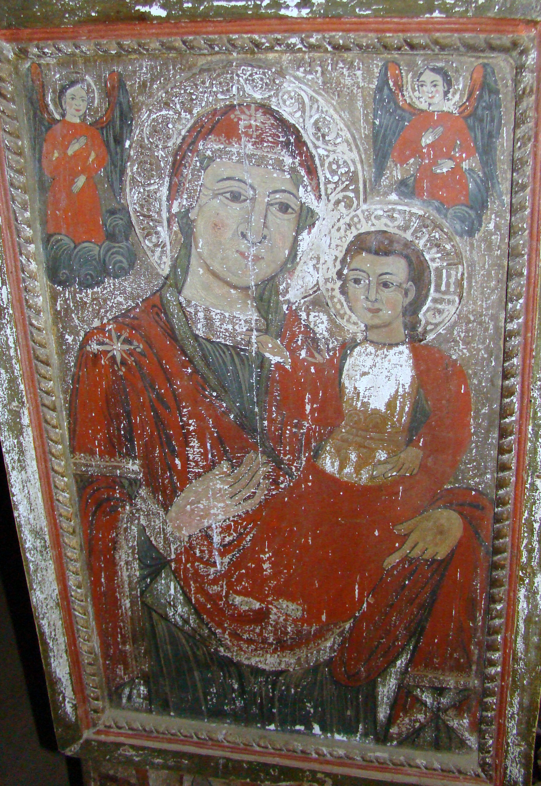 Maica Domnului cu Pruncul. Biserica de lemn „Sfinții Arhangheli Mihail și Gavriil" din Derșida, județul Sălaj